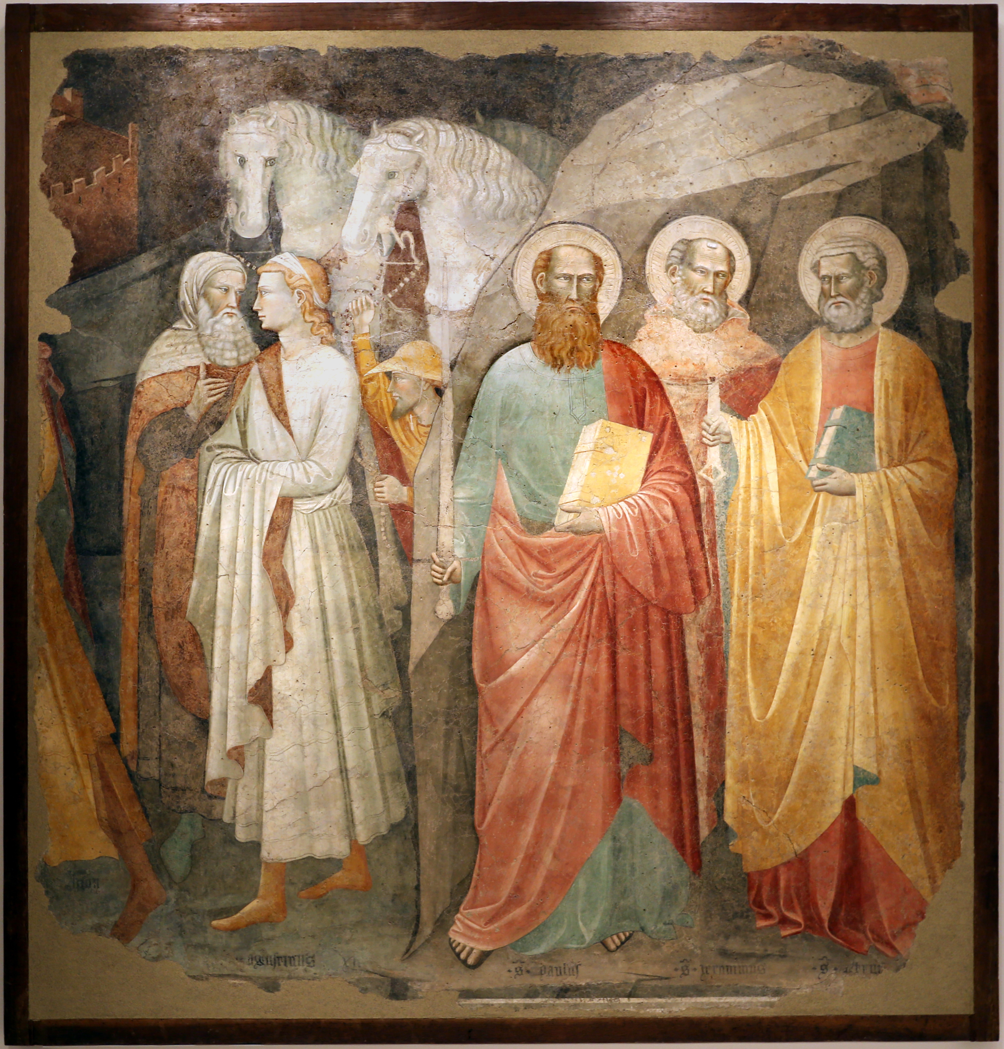 chiesa di San Giacomo Apostolo dei Domenicani This is a photo of a monument which is part of cultural heritage of Italy.